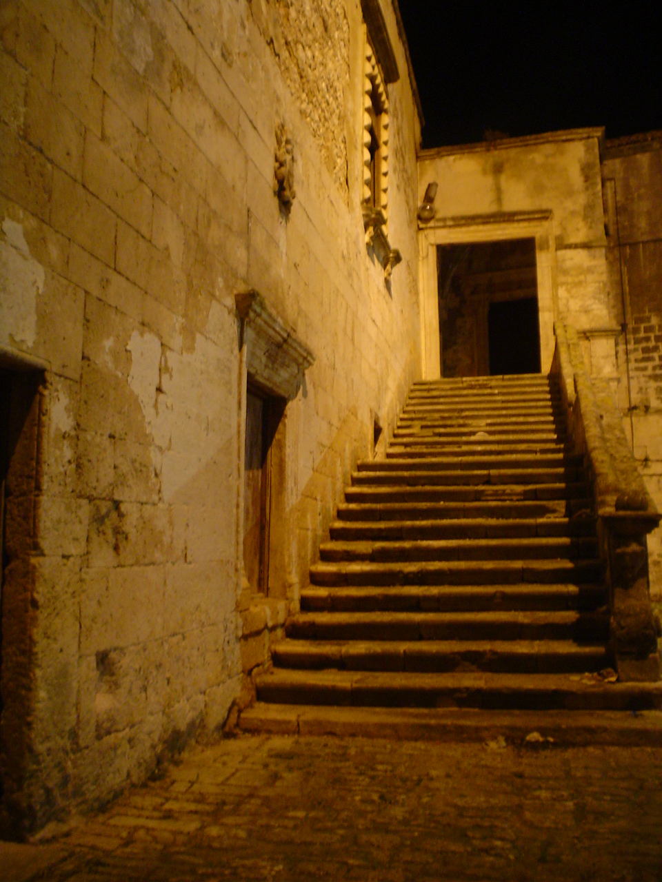 foto non professionali e assolutamente di pubblico dominio da me fatte in data 01/01/06